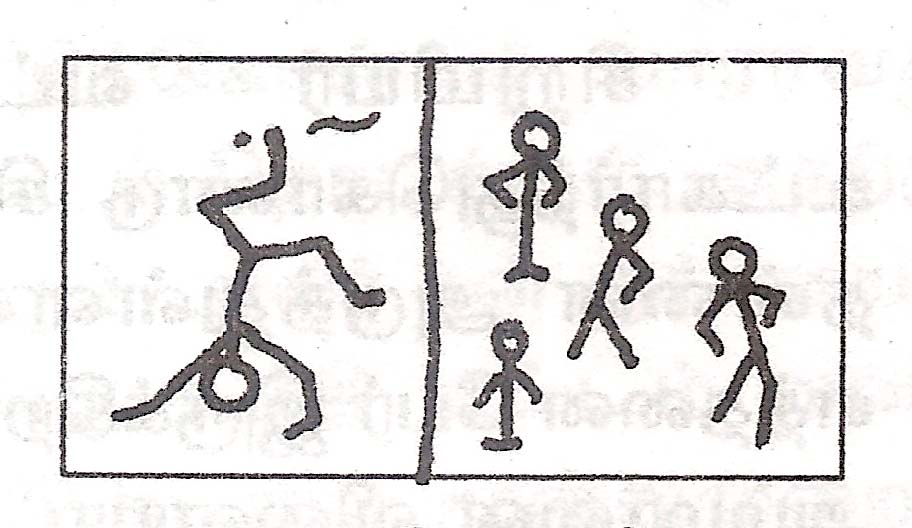 கரணப்பந்து விளையாட்டைக் காட்டும் கோட்டுருவப் படம். - மறைகின்ற விளையாட்டுகள் என்னும் எனது நூலிலிருந்து எடுத்துப் பதிவேற்றப்பட்டது.